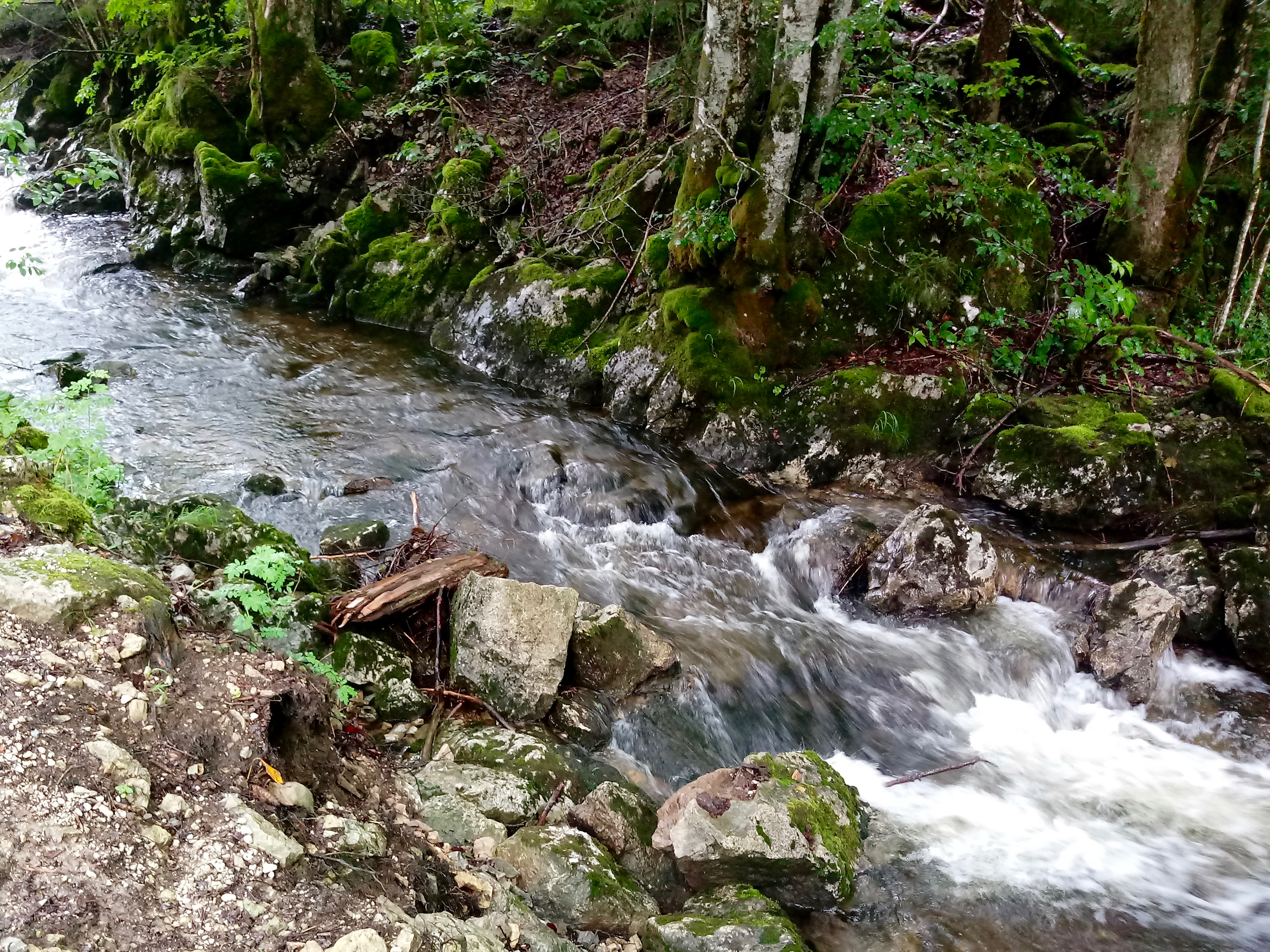 Schwarzenbach beim Schwarzensee im Salzkammergut.